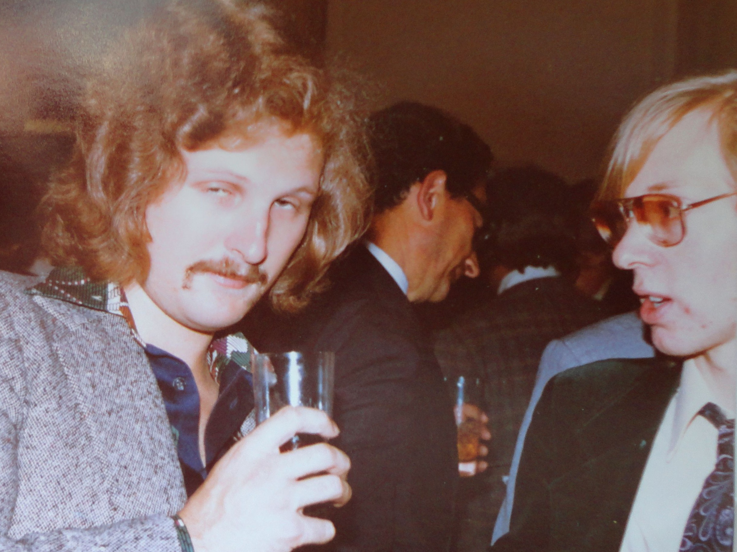 Tony Miles und Murray Chandler, Interzonenturnier 1979 in Rio de Janeiro.